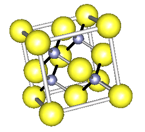 Zinkblende